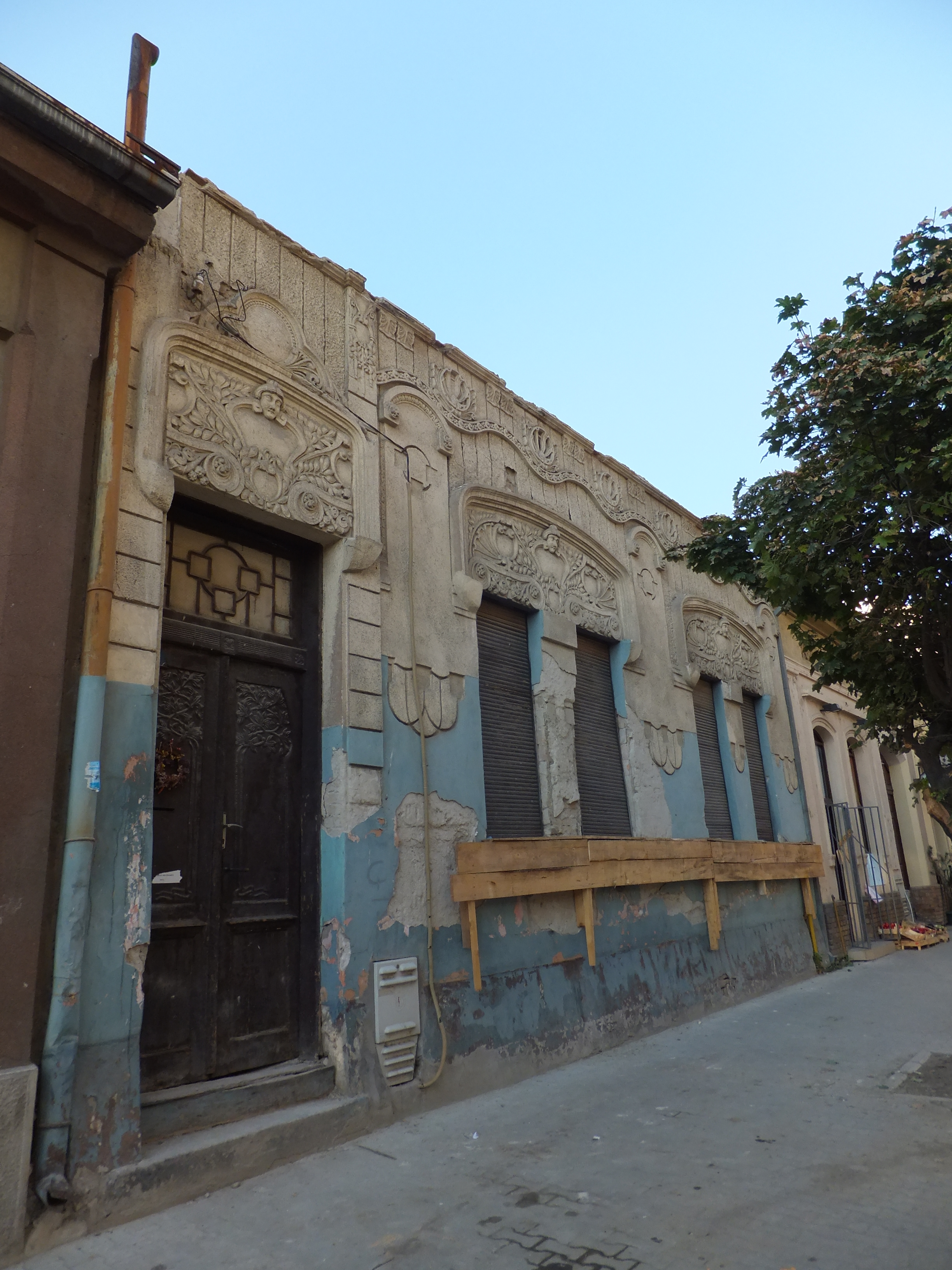 Зграда у Улици Браће Јовановића 13